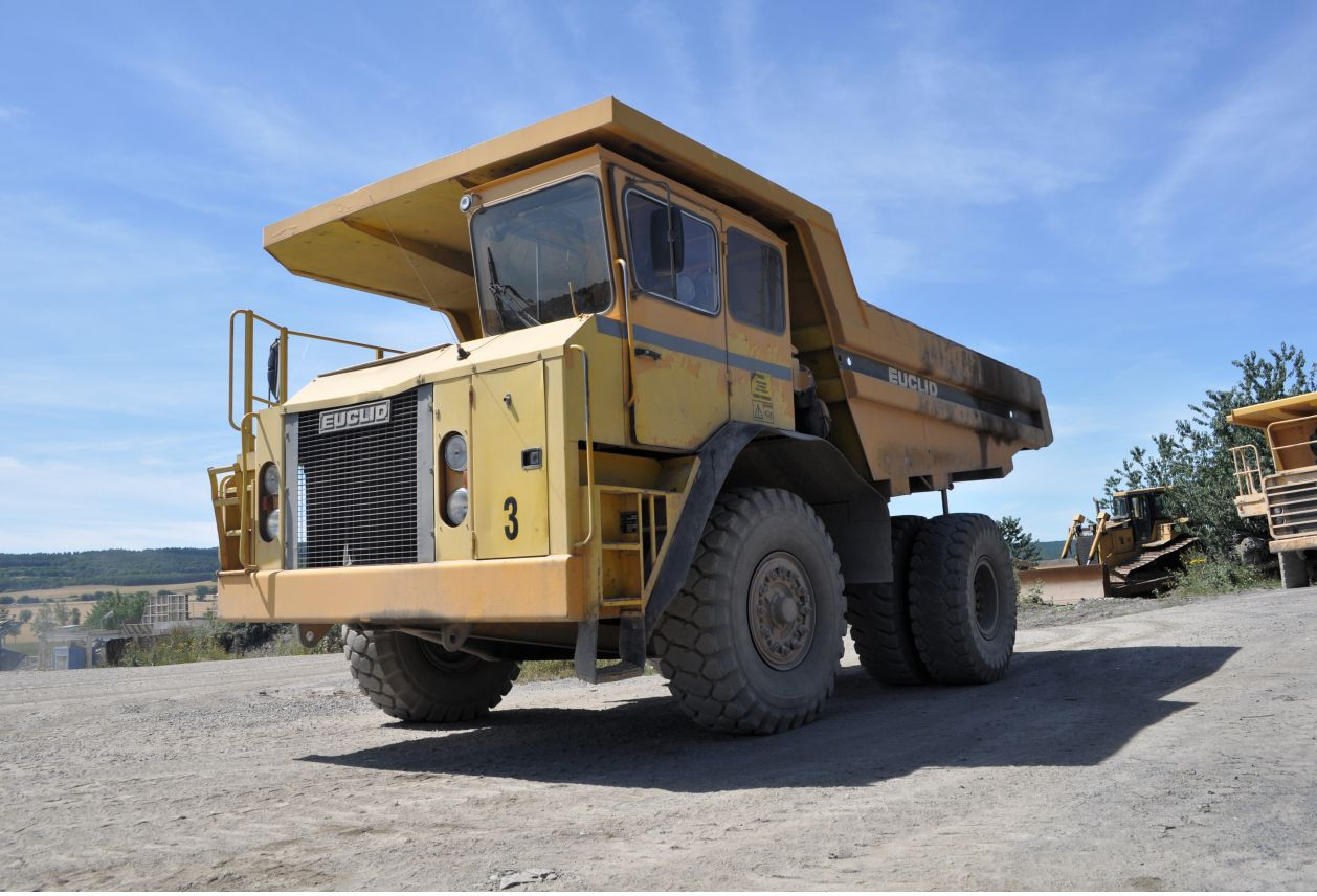 Kopalnia bazaltu "Winna Góra"